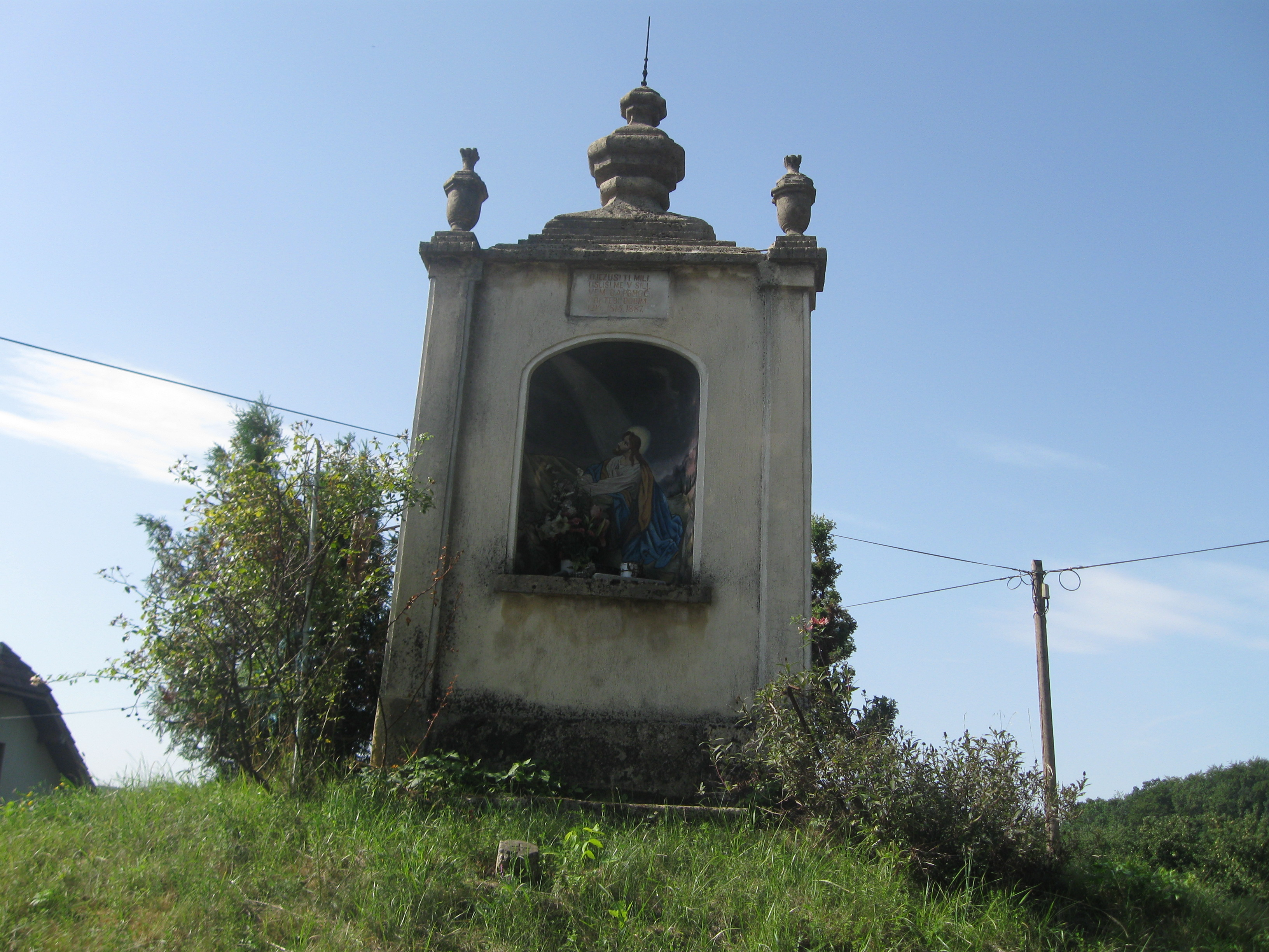 Borov križ iz leta 1610 z nišo, vazami in kardinalskim križem v Zamarkovi (Občina Lenart). Kulturni spomenik lokalnega pomena.